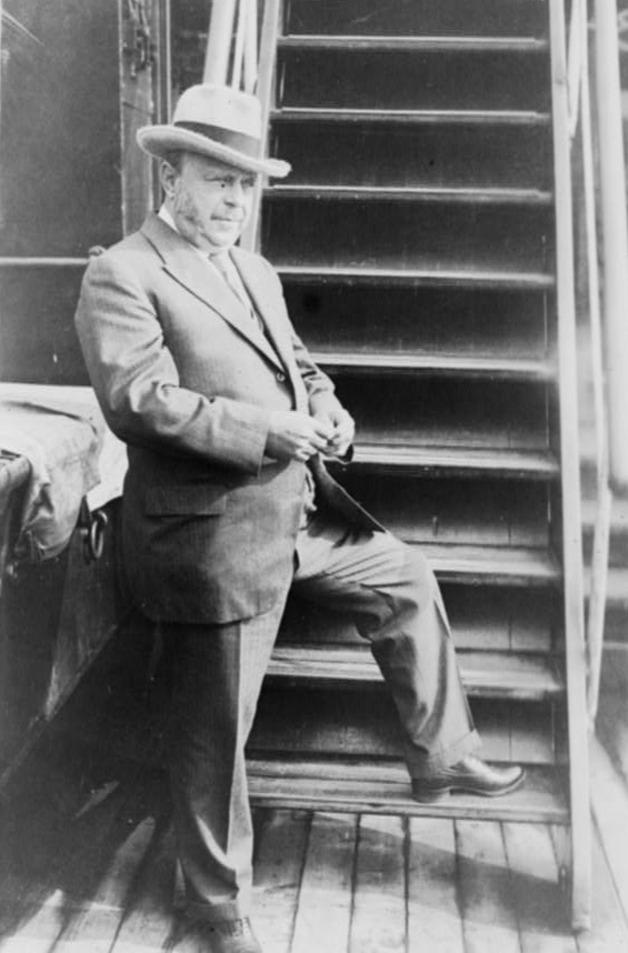 August Anheuser Busch, Sr.